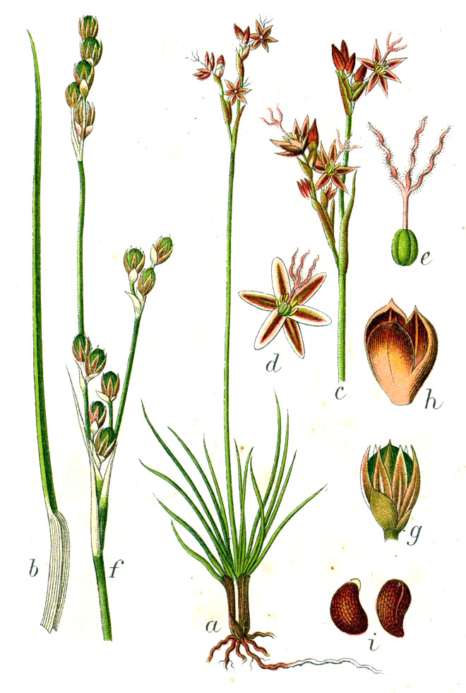 Juncus squarrosus L. Original Caption Heine-Binse, Juncus squarrosus